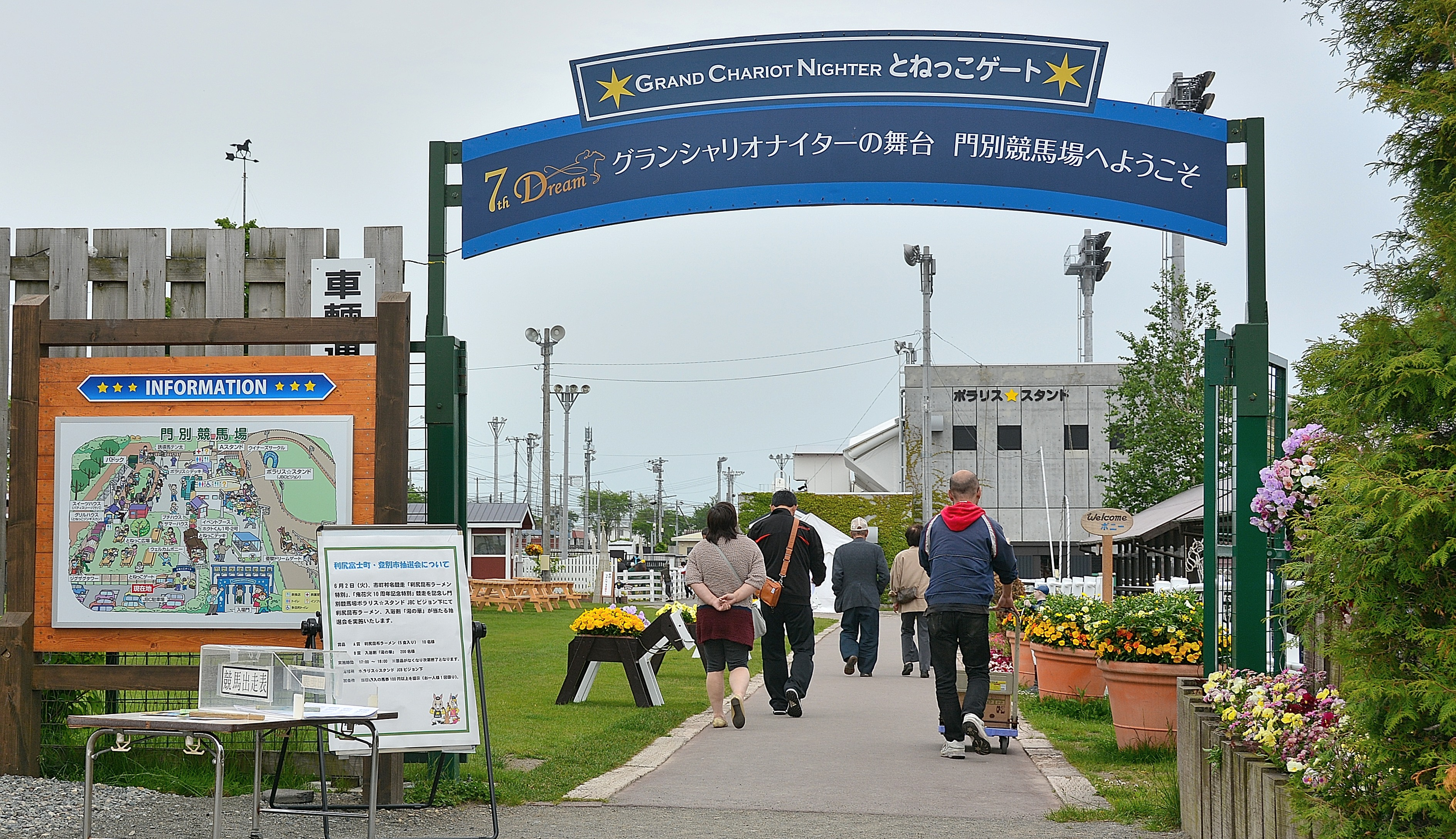 2015年6月2日に、門別競馬場の「とねっこゲート」を撮影したもの。